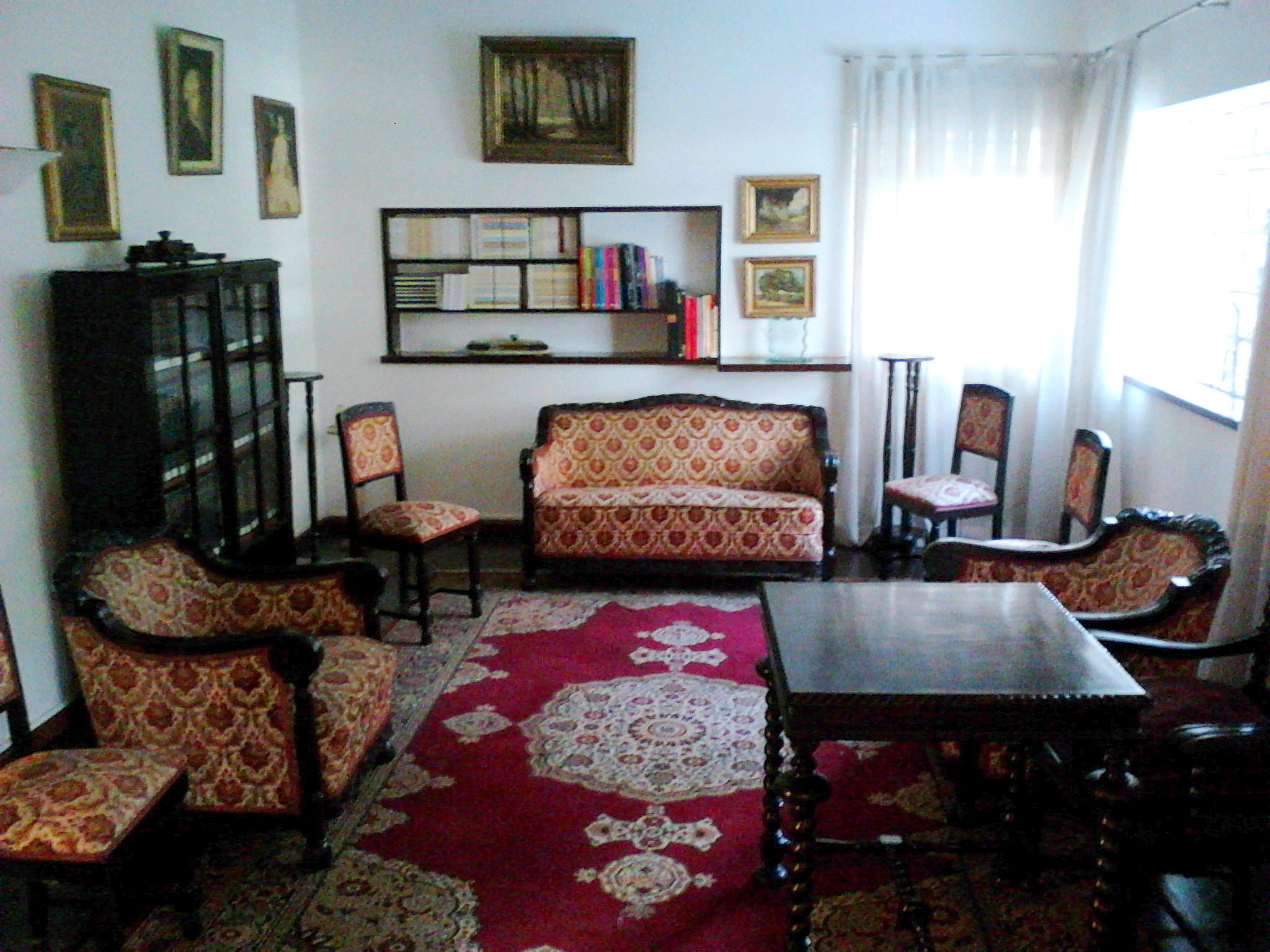 Ambiente interno do Centro Cultural e de Estudos Superiores Aúthos Pagano.